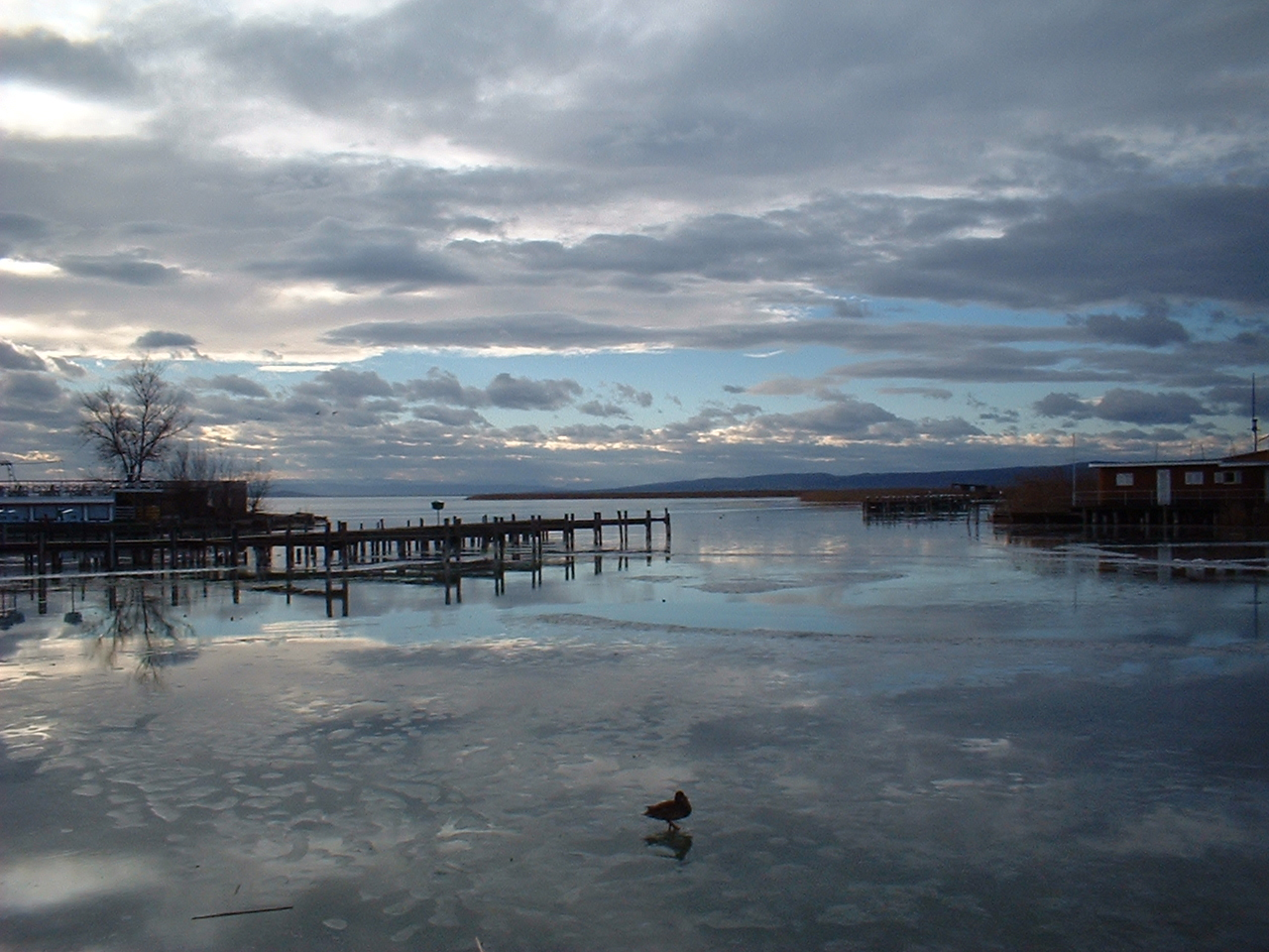 Neusiedler See - Blick von Neusiedl nach Süden